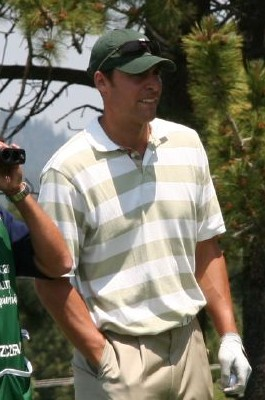 Wally Szczerbiak